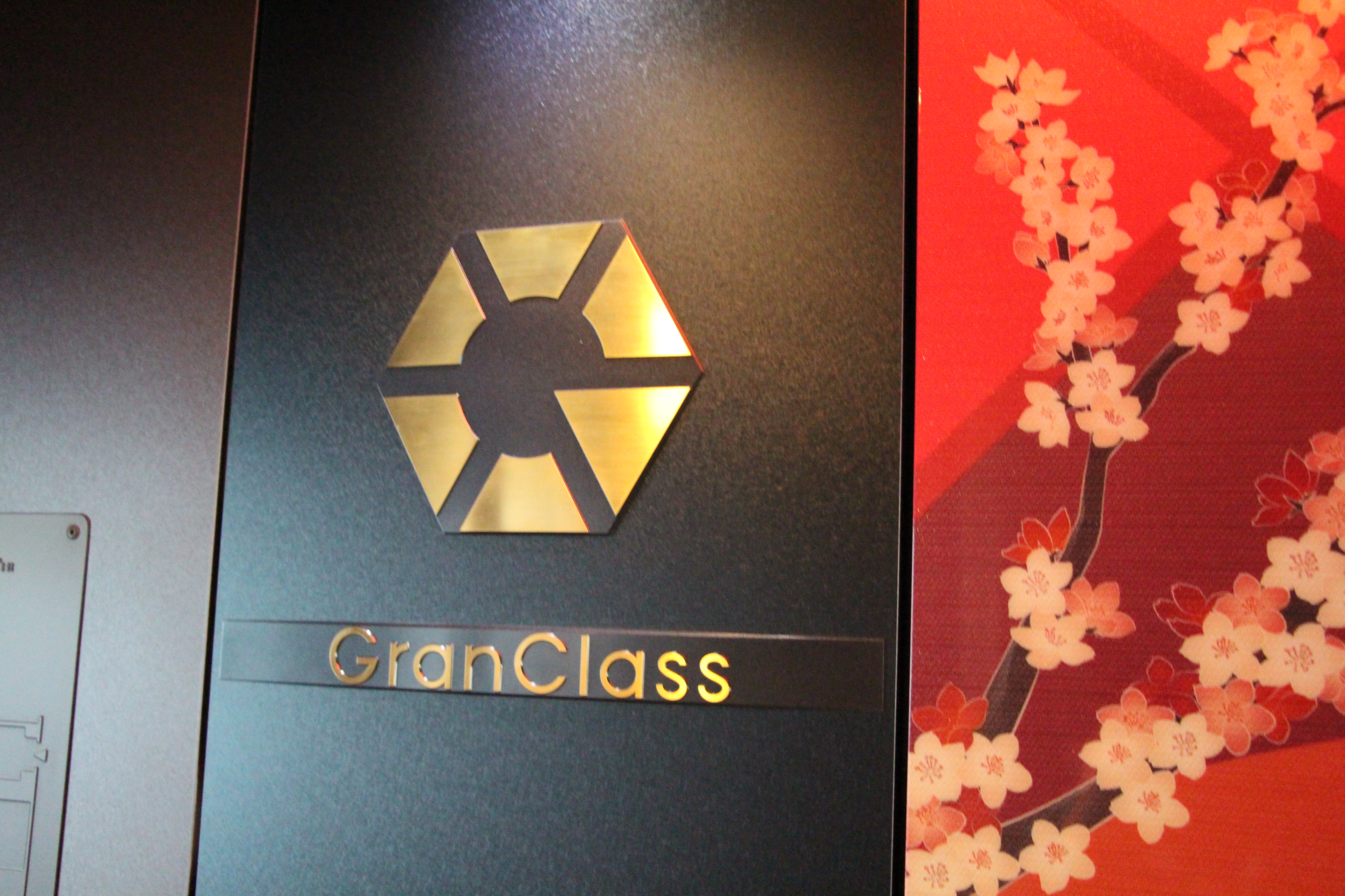 長野新幹線E7系グランクラス